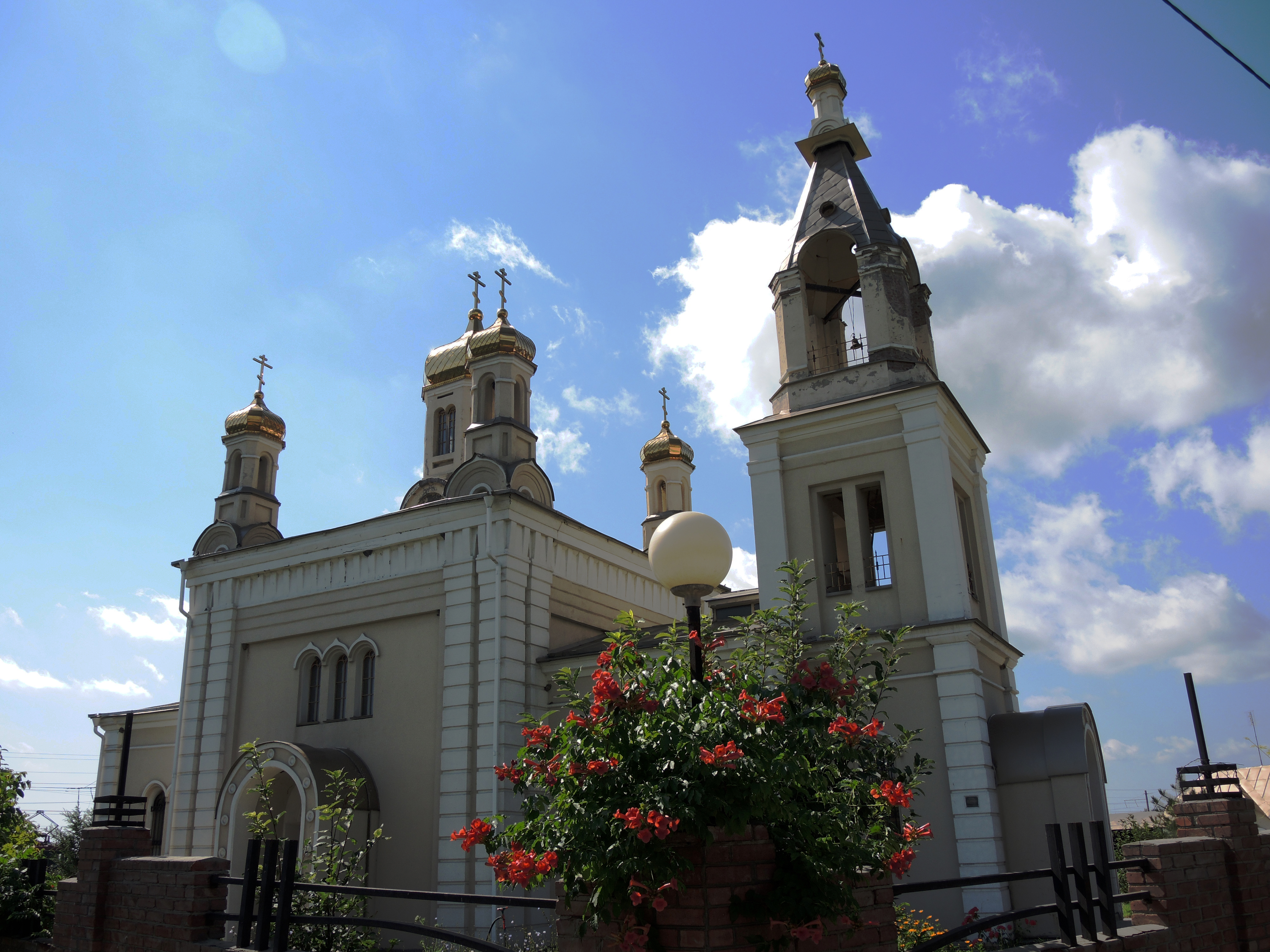 Домовая церковь Рождества Богородицы (усыпальница М.И. Платова): Малый Мишкин, Аксайский район, Ростовская область